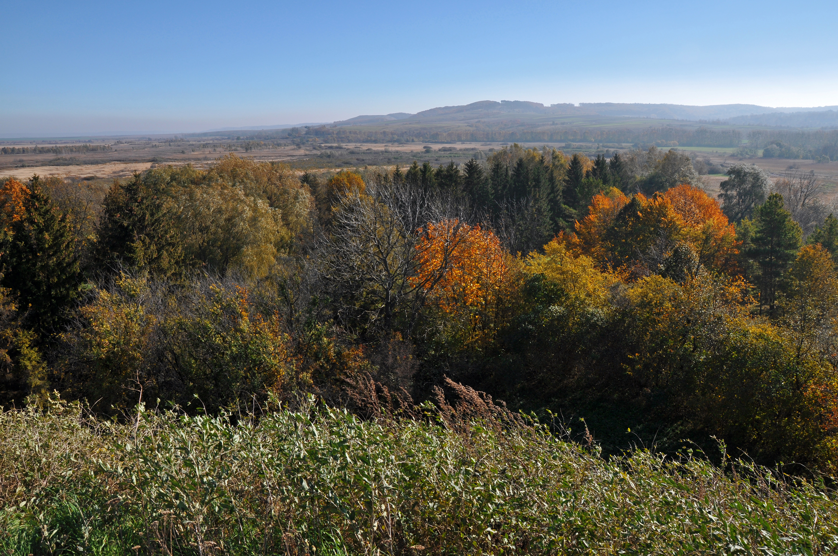 Північне Поділля, Бродівський, Буський, Золочівський райони